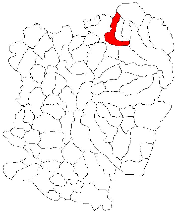 Categorie:Hărţi ale judeţului Caraş-Severin